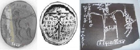 Cruces Gnósticas y asno priápico.